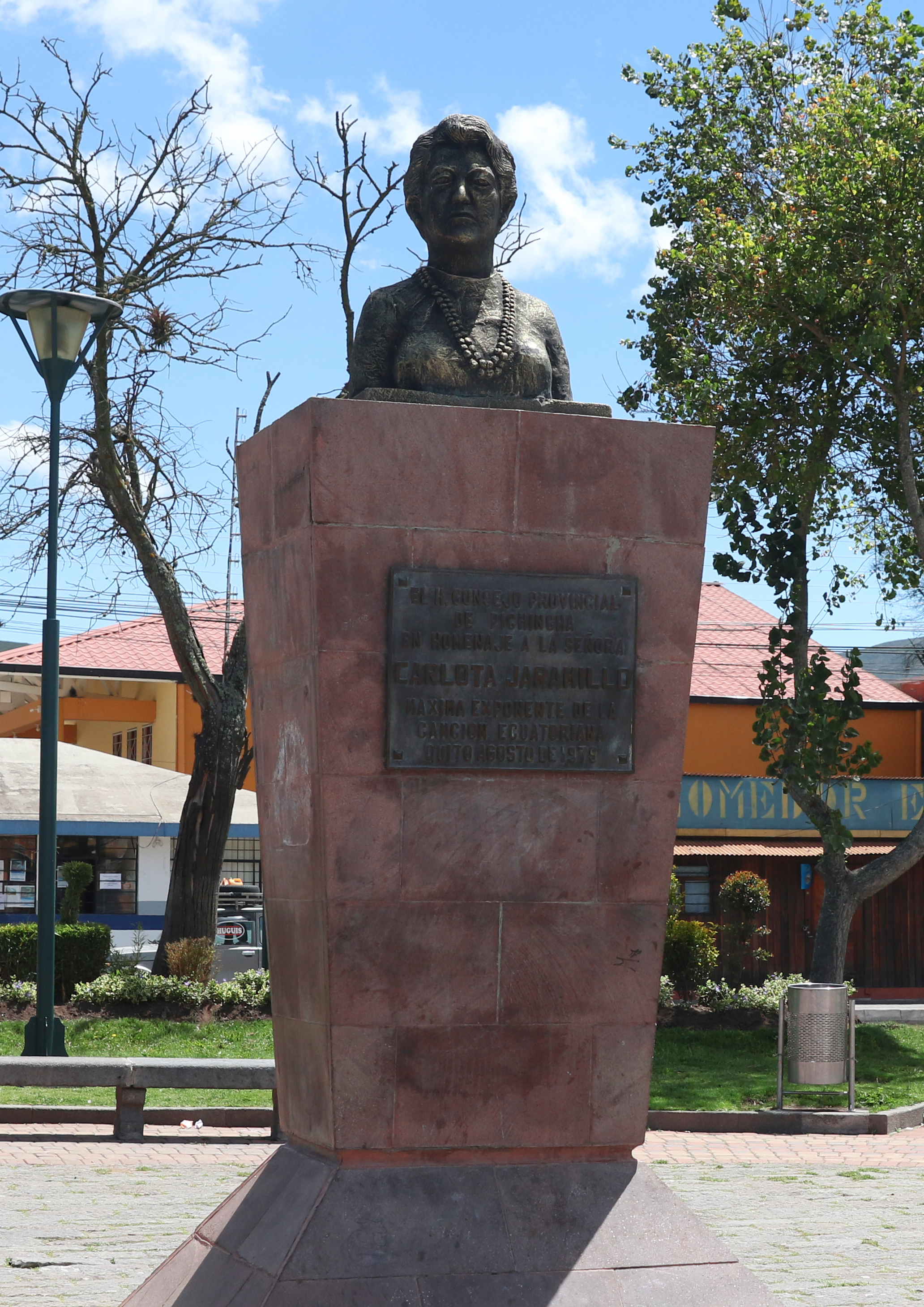 MUSEO-CASA DE CARLOTA JARAMILLO "LA REINA DE LA CANCIÓN NACIONAL" MUSEO-CASA DE CARLOTA JARAMILLO "LA REINA DE LA CANCIÓN NACIONAL"